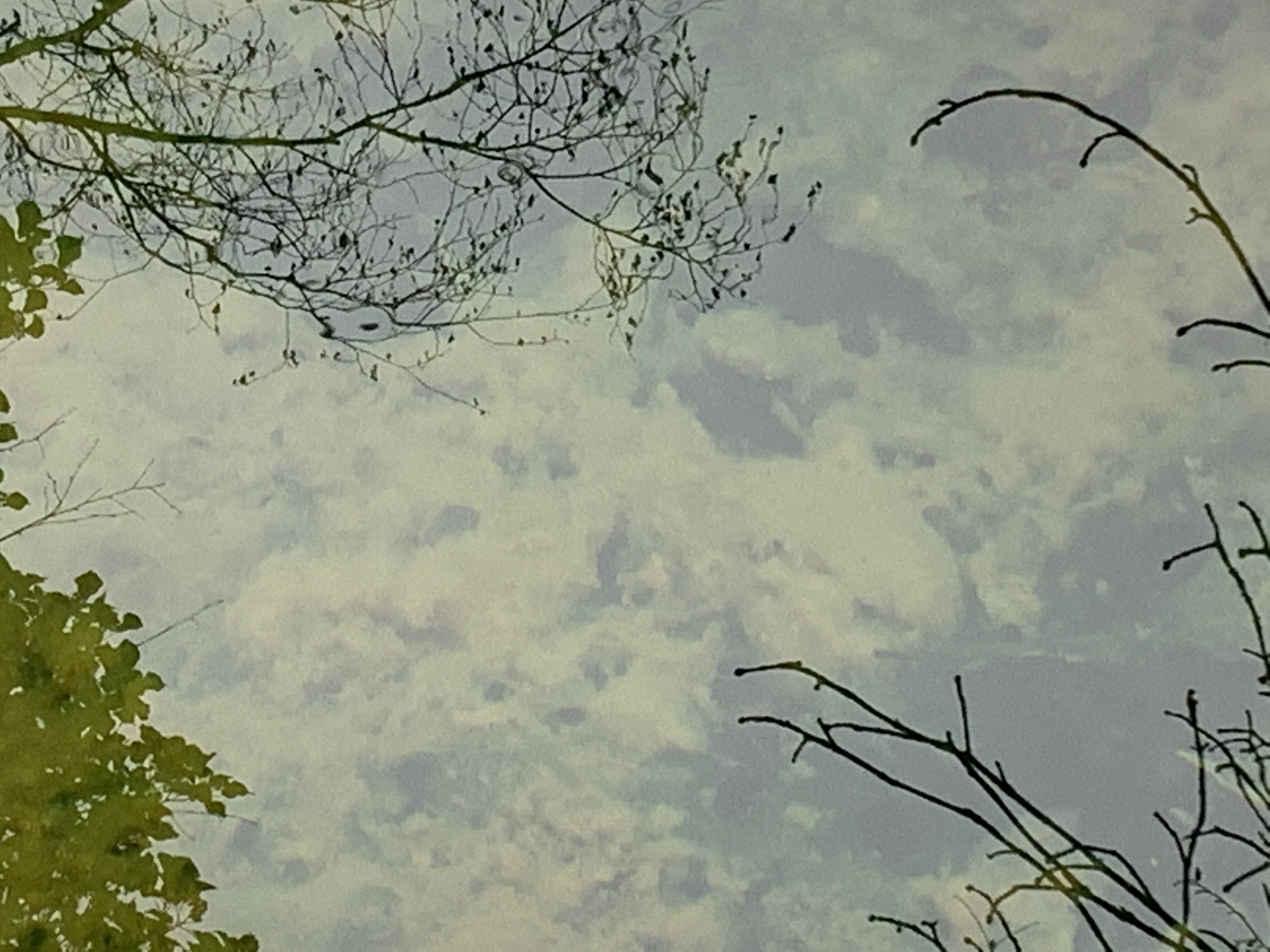 Der Goldborn ist eine Quelle in Werchow, einem Ortsteil der Stadt Calau in Brandenburg. Sein Vorfluter ist das Göritzer Fließ, das in die Spree entwässert.